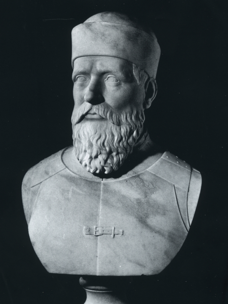 Busto di Vettor Pisani. Il busto fa parte del Panteon Veneto, conservato presso Palazzo Loredan di Campo Santo Stefano a Venezia.